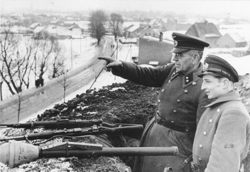 Zentralbild, II. Weltkrieg 1939-45 Am 18.11.1944 verkündet Adolf Hitler den Volkssturm. Alle waffenfähigen Männer von 16-60 Jahren beim Volkssturm. UBz: Volkssturmmänner aus Gleiwitz in Ratibor/Oberschlesien am 2. Februar 1945 im Einsatz